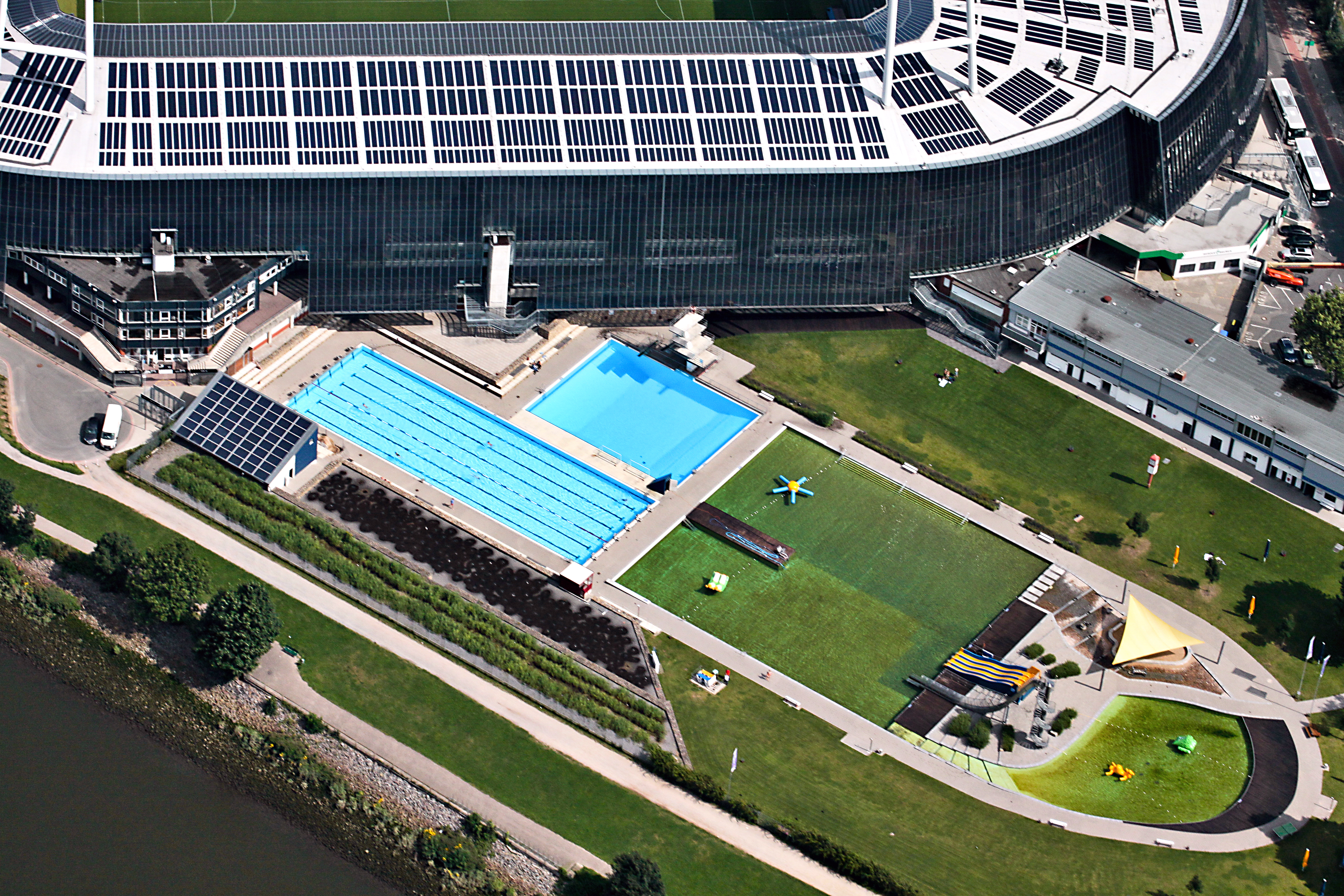 Lufbilder Bremen: Steintor, Weserstadion, Fesenfeld, Altstadt, Hohentor (identische Bildbeschreibung für File:2012-08-08-fotoflug-bremen zweiter flug 0618.JPG bis File:2012-08-08-fotoflug-bremen zweiter flug 0749.JPG; alle mit GPS-Koordinaten